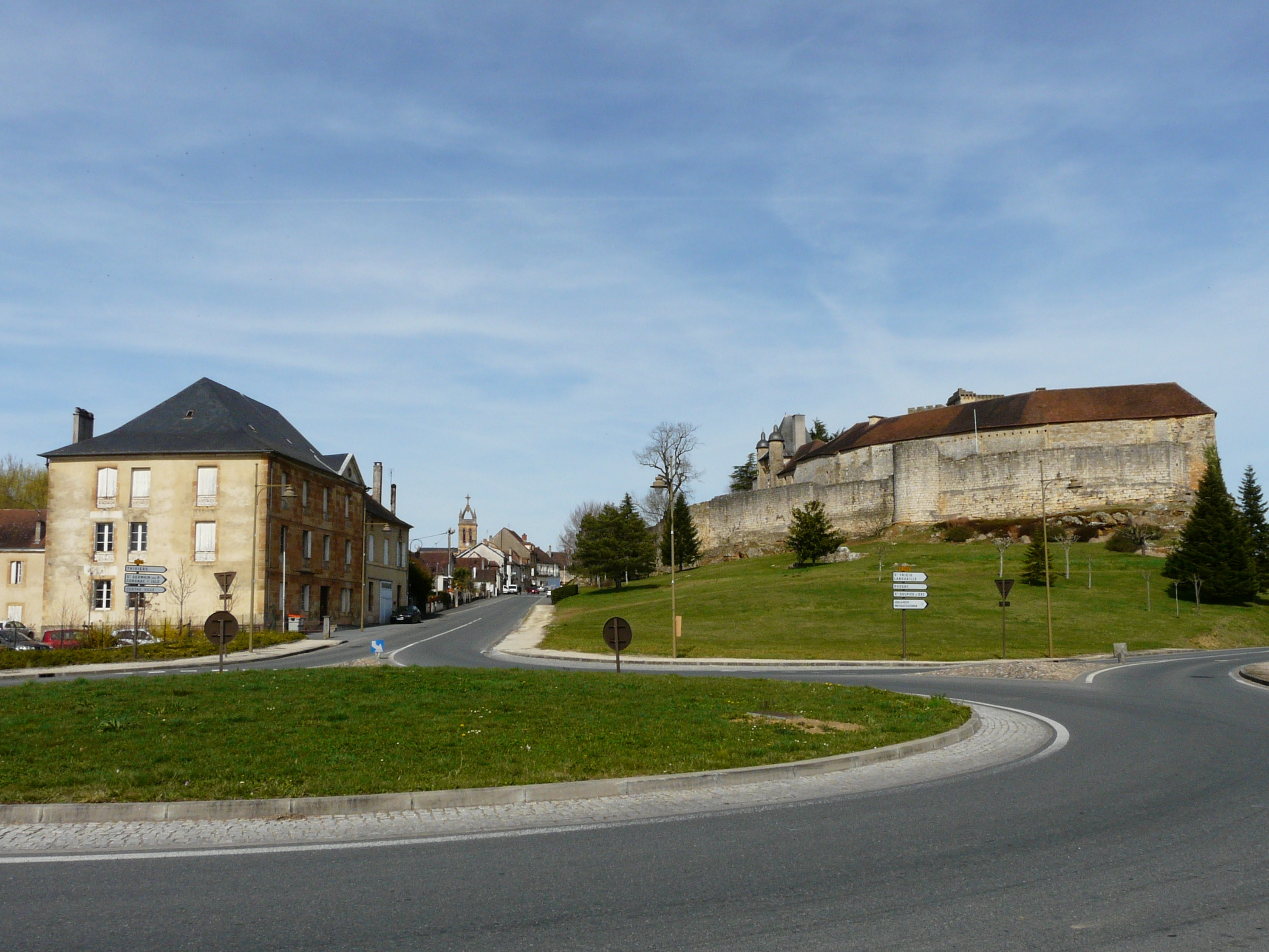 L'entrée sud-ouest d'Excideuil, Dordogne, France. Sur la droite, le château d'Excideuil.